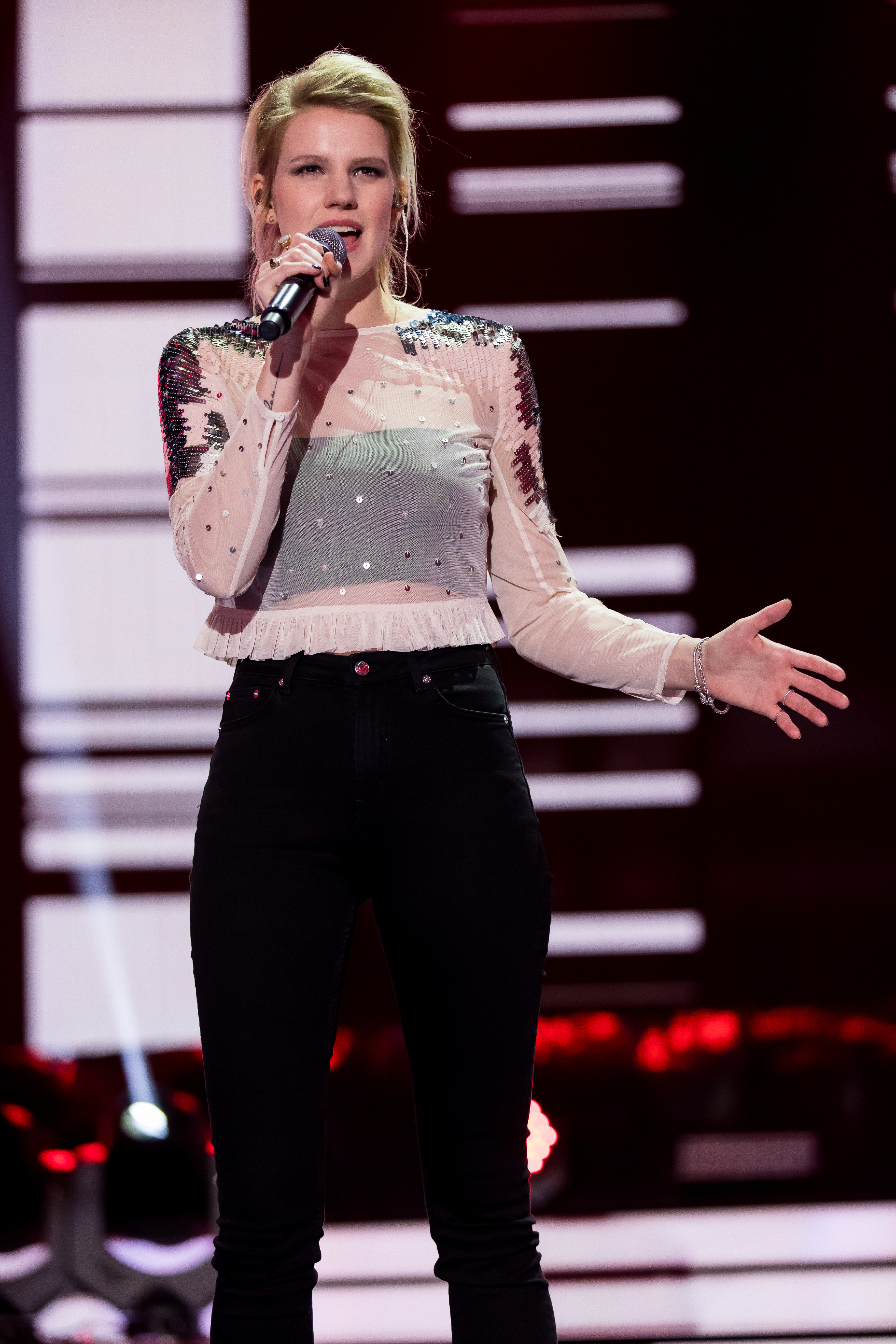 Unser Song 2017 (Probentag) für Eurovision Song Contest 2017 during Eurovision Song Contest - Unser Song 2017 at , Köln, Nordrhein-Westfalen, Germany on 2017-02-08, Photo: Sven Mandel